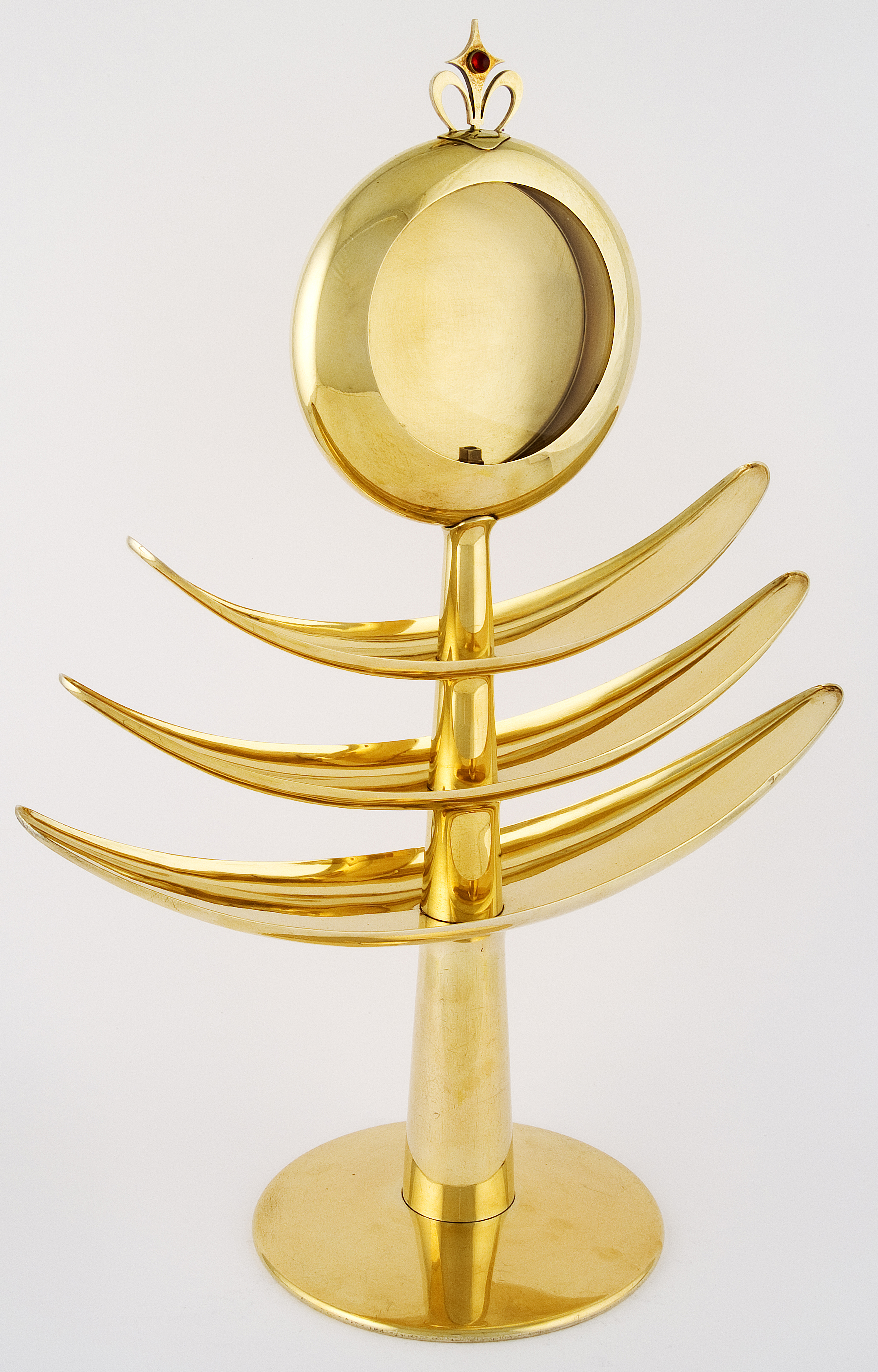 (Lebens-) Baummonstranz von Fritz Schwerdt, 1947. Ausführung 1956 für St. Antonius von Padua, Habbelrath.